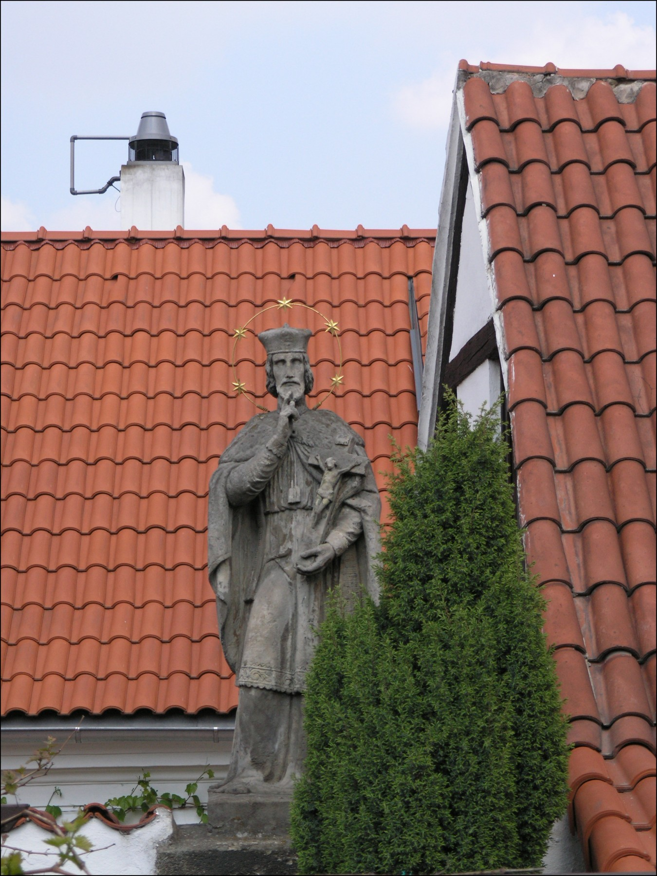 Praha, Břevnov - Za Strahovem (sv. Jan Nepomucký)